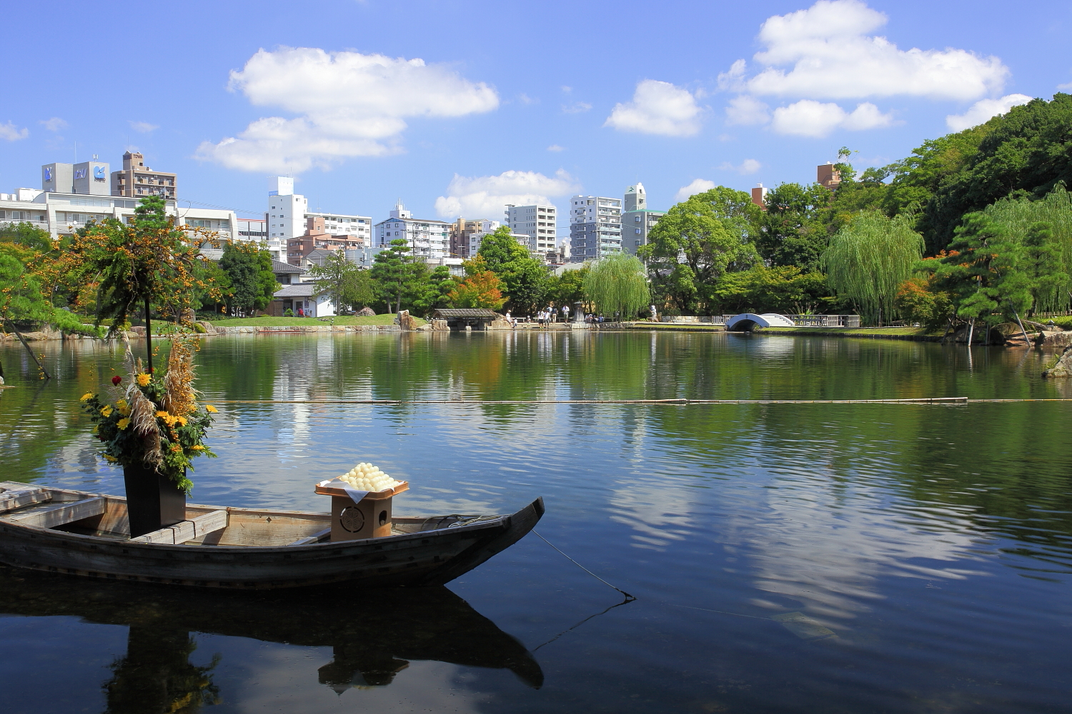 徳川園龍仙湖（名古屋市東区徳川町、2014年（平成26年）9月）